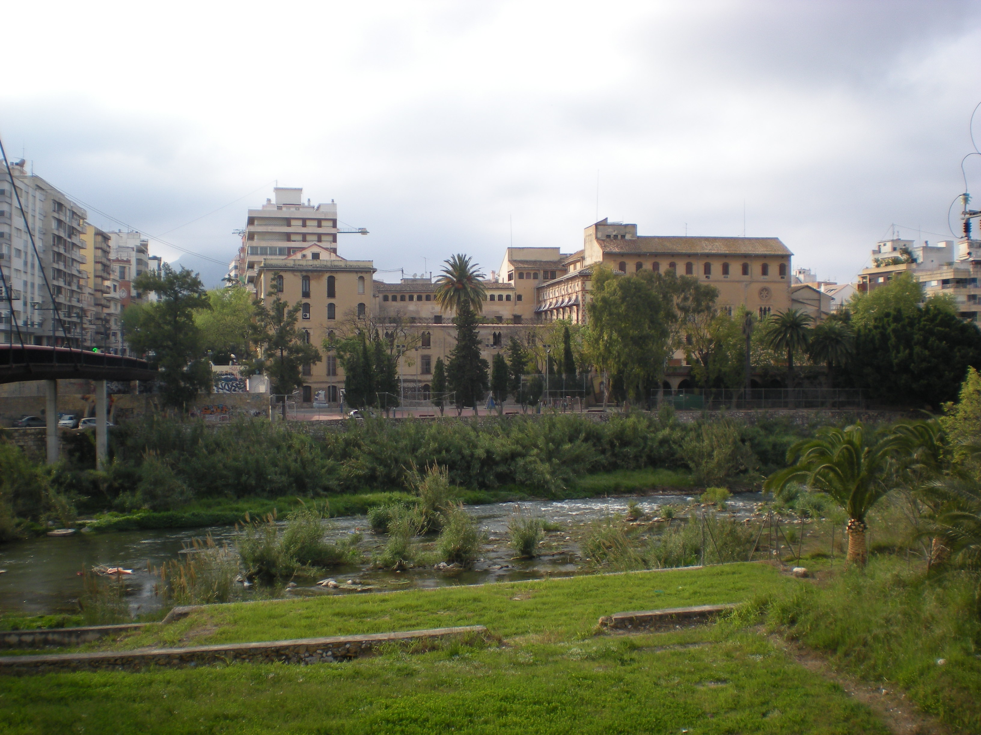 Riu Serpis (Gandia)